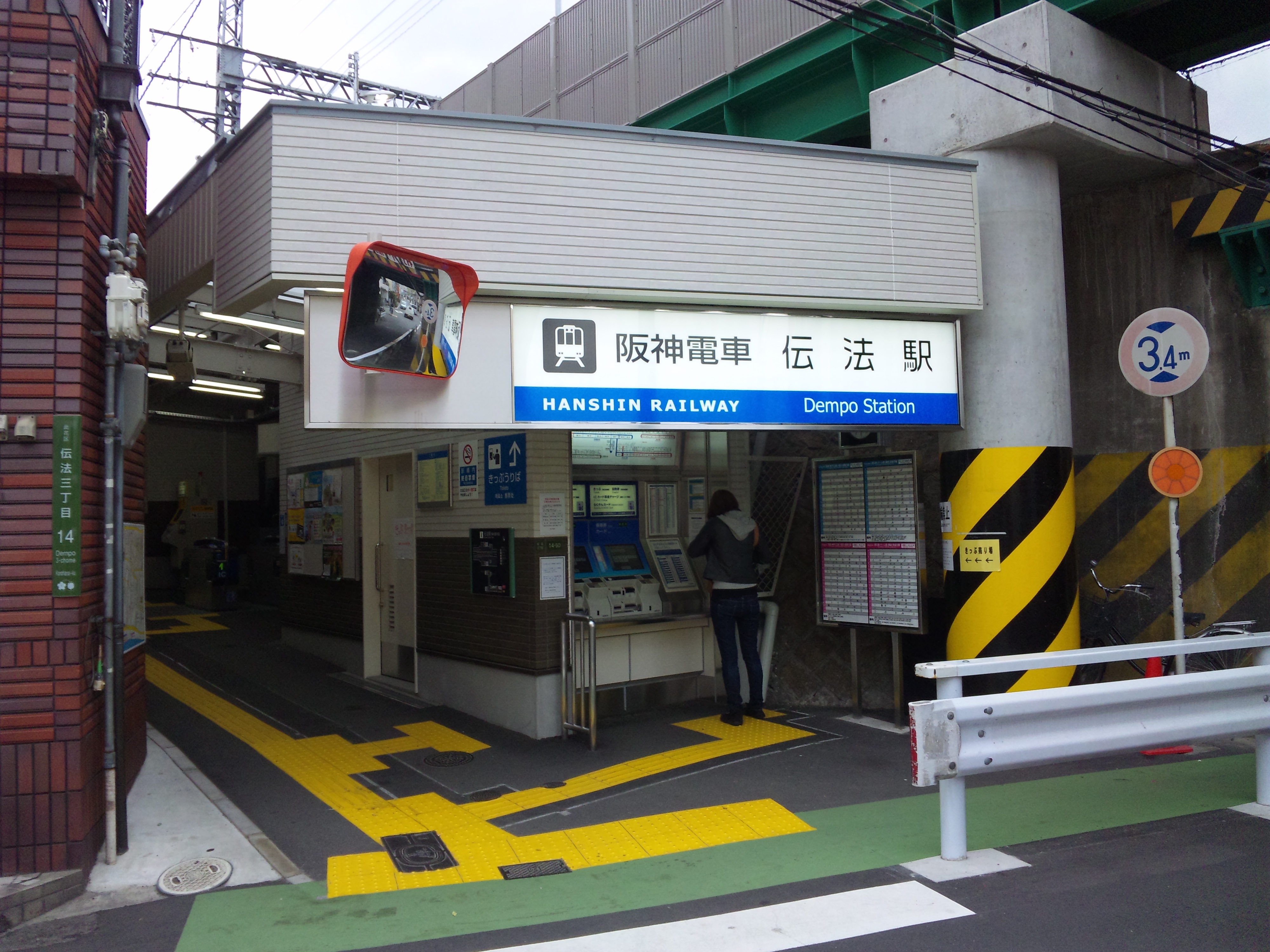 阪神伝法駅新駅舎